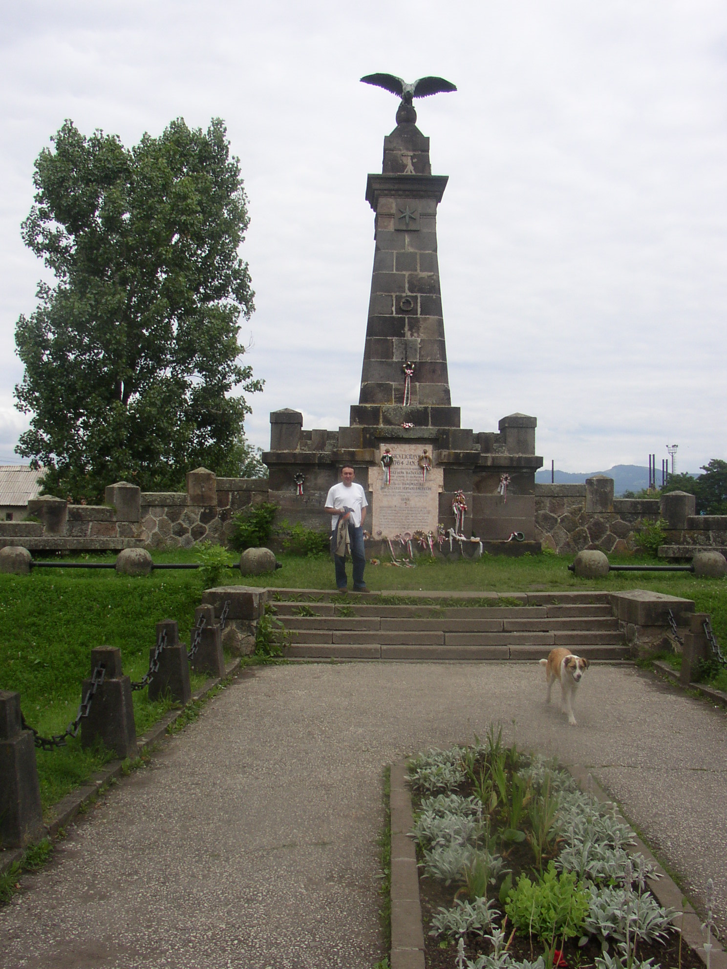 Mádéfalva, Siculicidium emlékmű